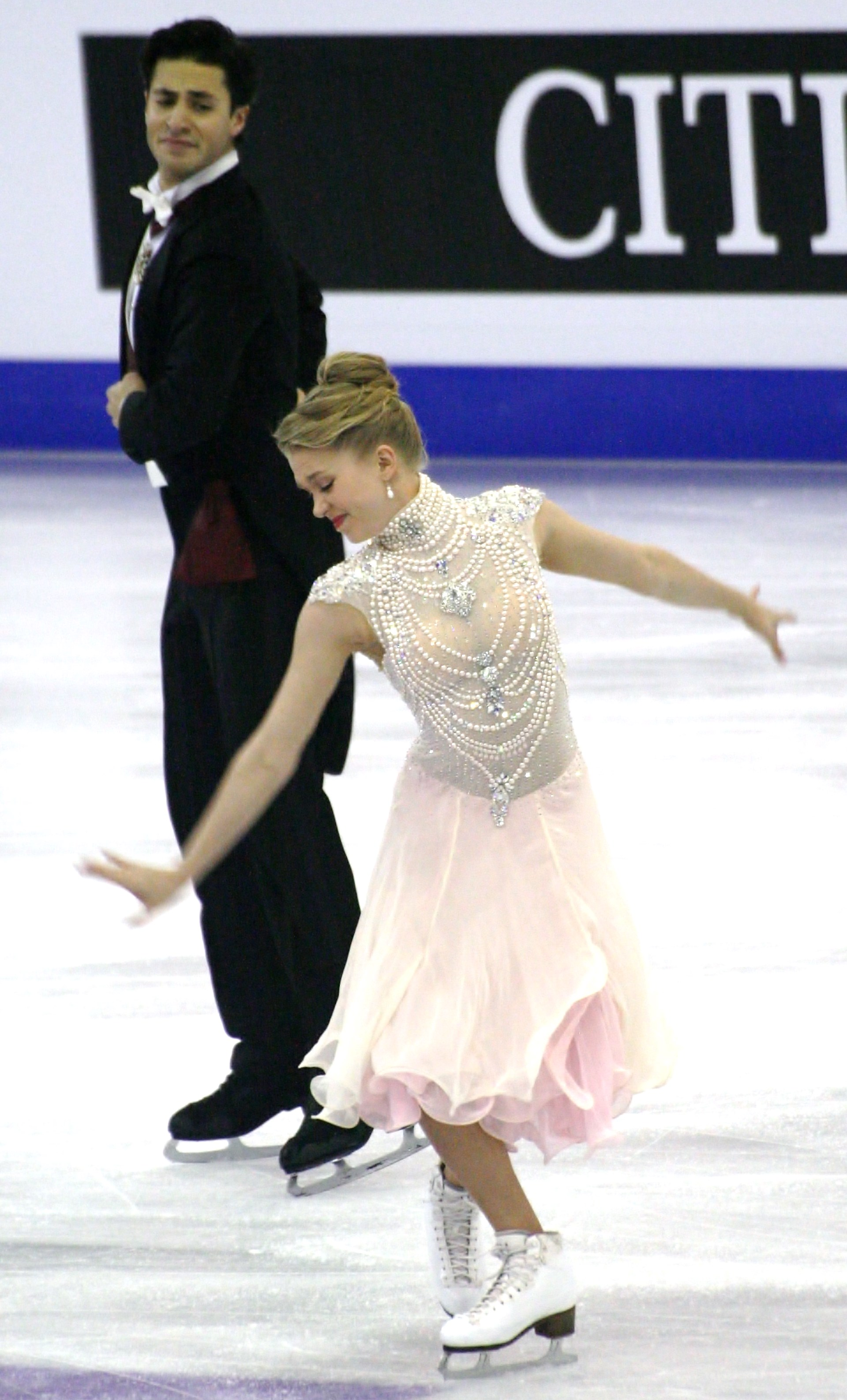 Кэйтлин Уивер и Эндрю Поже (Канада) на финале Гран-при по фигурному катанию 2015-2016.